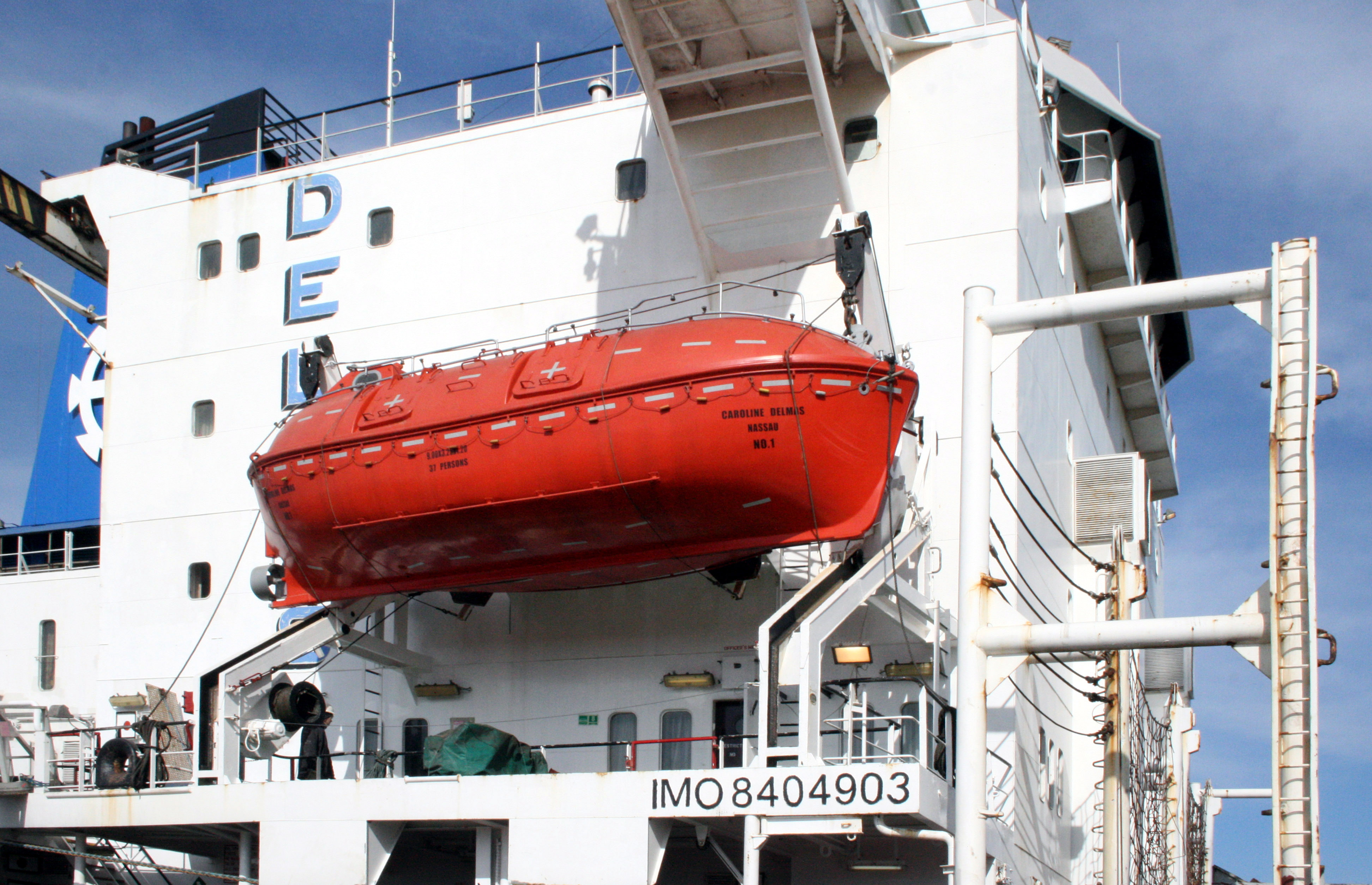 Caroline Delmas dans le port de la Pallice à la Rochelle